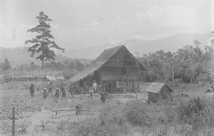 foto. Militairen bij een paalwoning in de Gajo- en Alaslanden